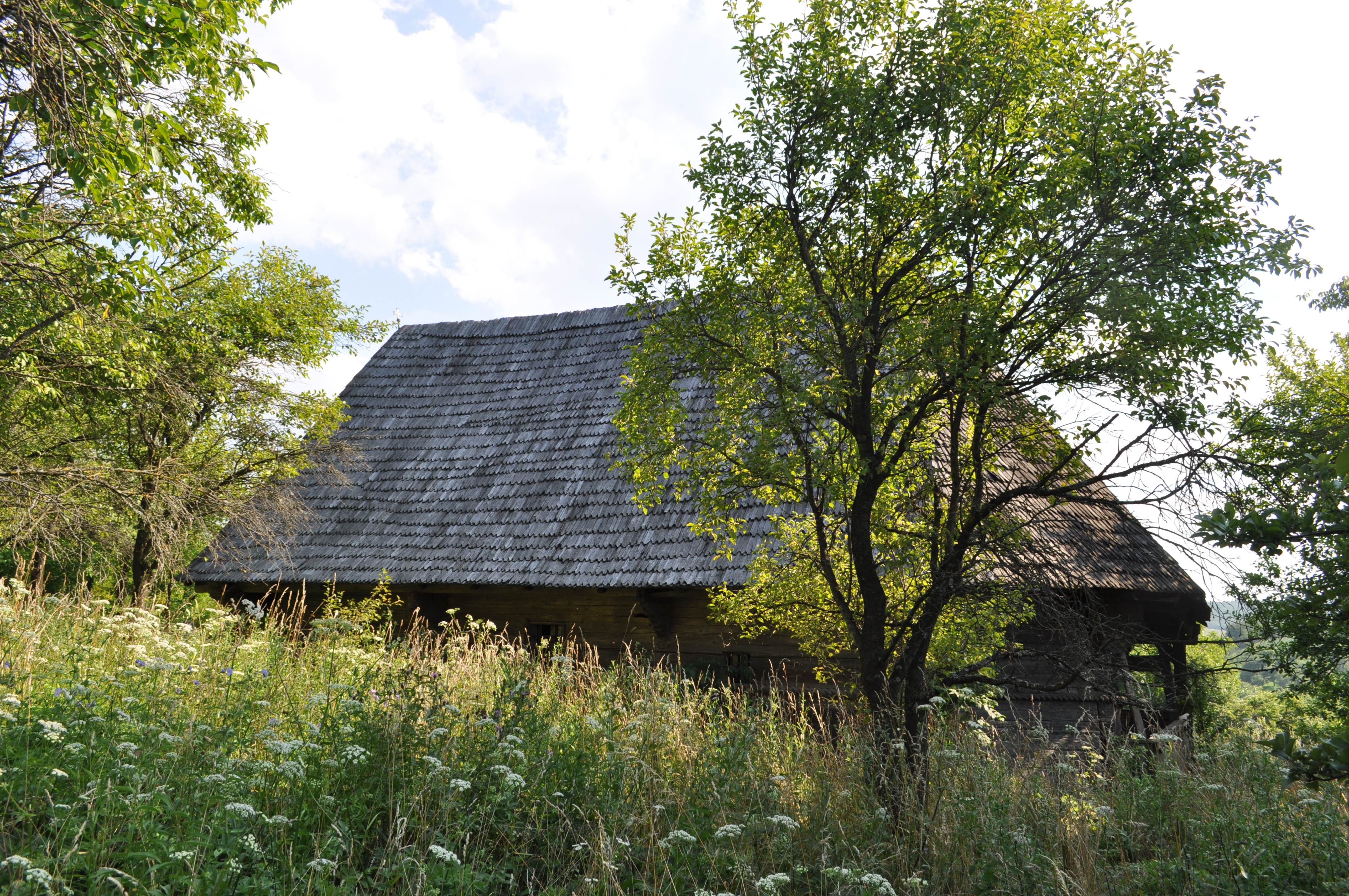 Biserica de lemn „Sfinții Arhangheli” din Băița, Mureș